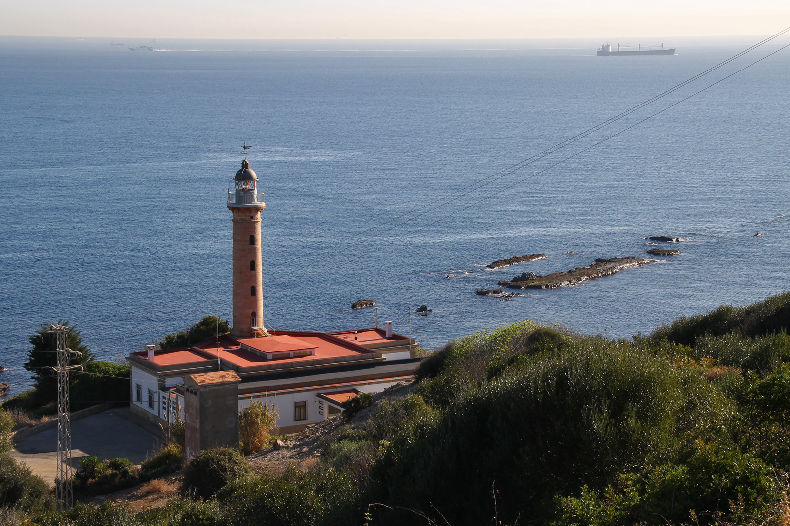 Faro de Punta Carnero